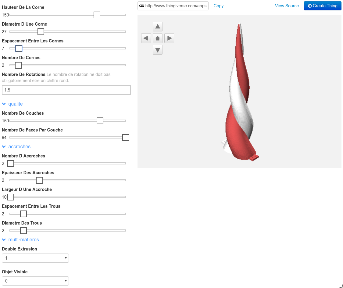 Cornelicorne